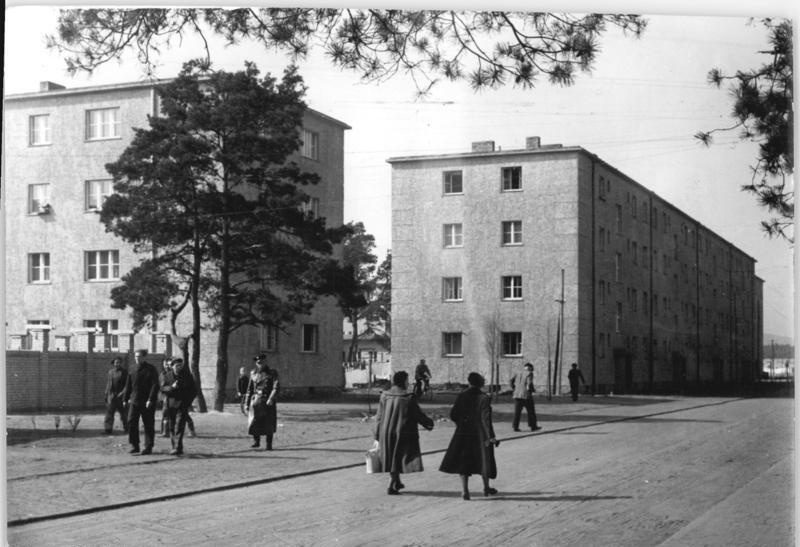 Eisenhüttenstadt, Wohnblöcke Zentralbild Krueger 25. 3 1953 Stalinstadt, die erste sozialistische Stadt Deutschlands Auf Beschluss des Zentralkomitees der Sozialistischen Einheitspartei Deutschland wird zu Ehren und zum Ruhm J. W. Stalins die Wohnstadt des Eisenhüttenkombinats Ost bei Fürstenberg "Stalinstadt " benannt werden. UBz: Blick in eine Strasse am Nordrand der Stadt. Diese Wohnblöcke wurden 1951 gebaut.